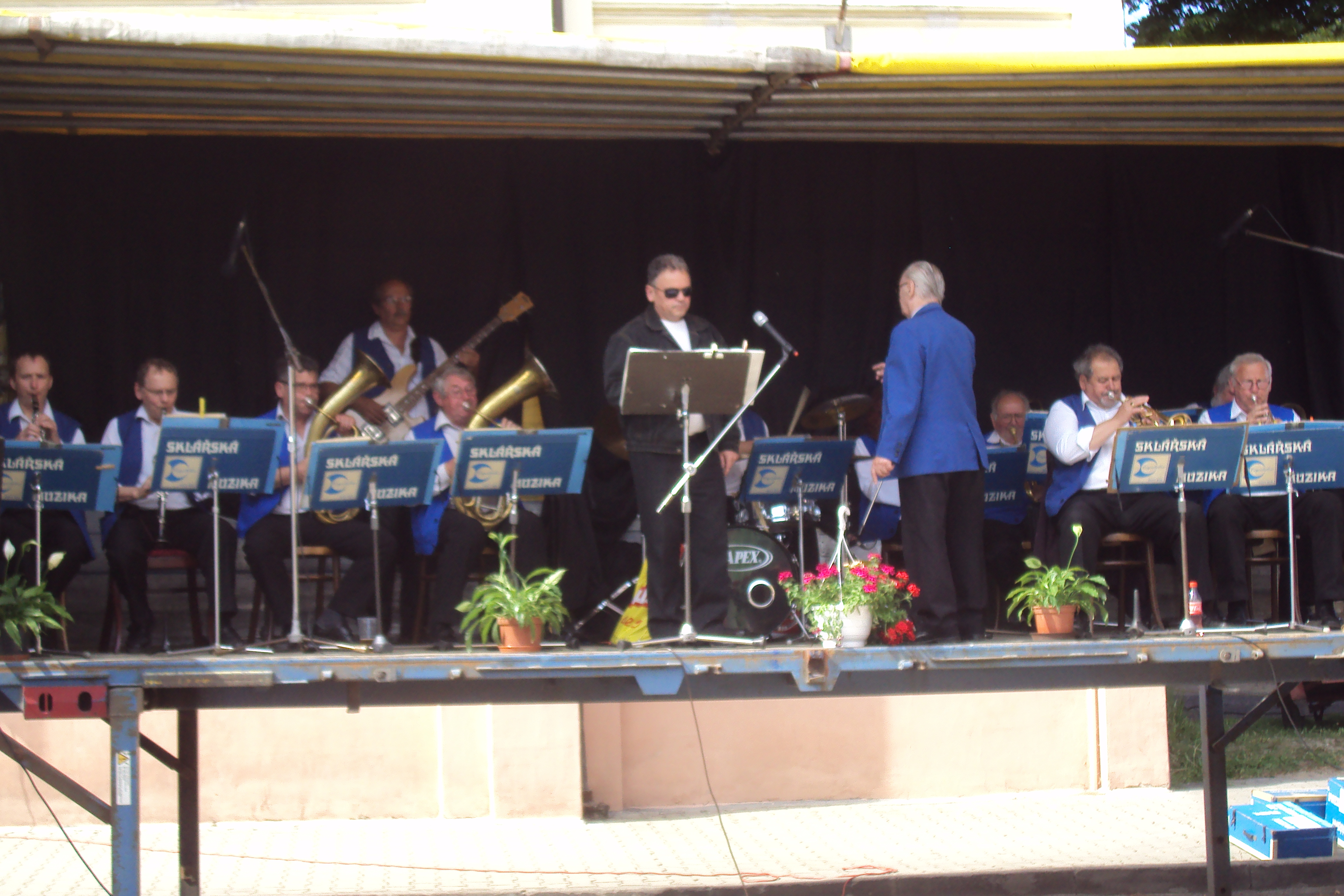 Dechovka Sklářská muzika z Nového Boru na akci v Nových Zákupech